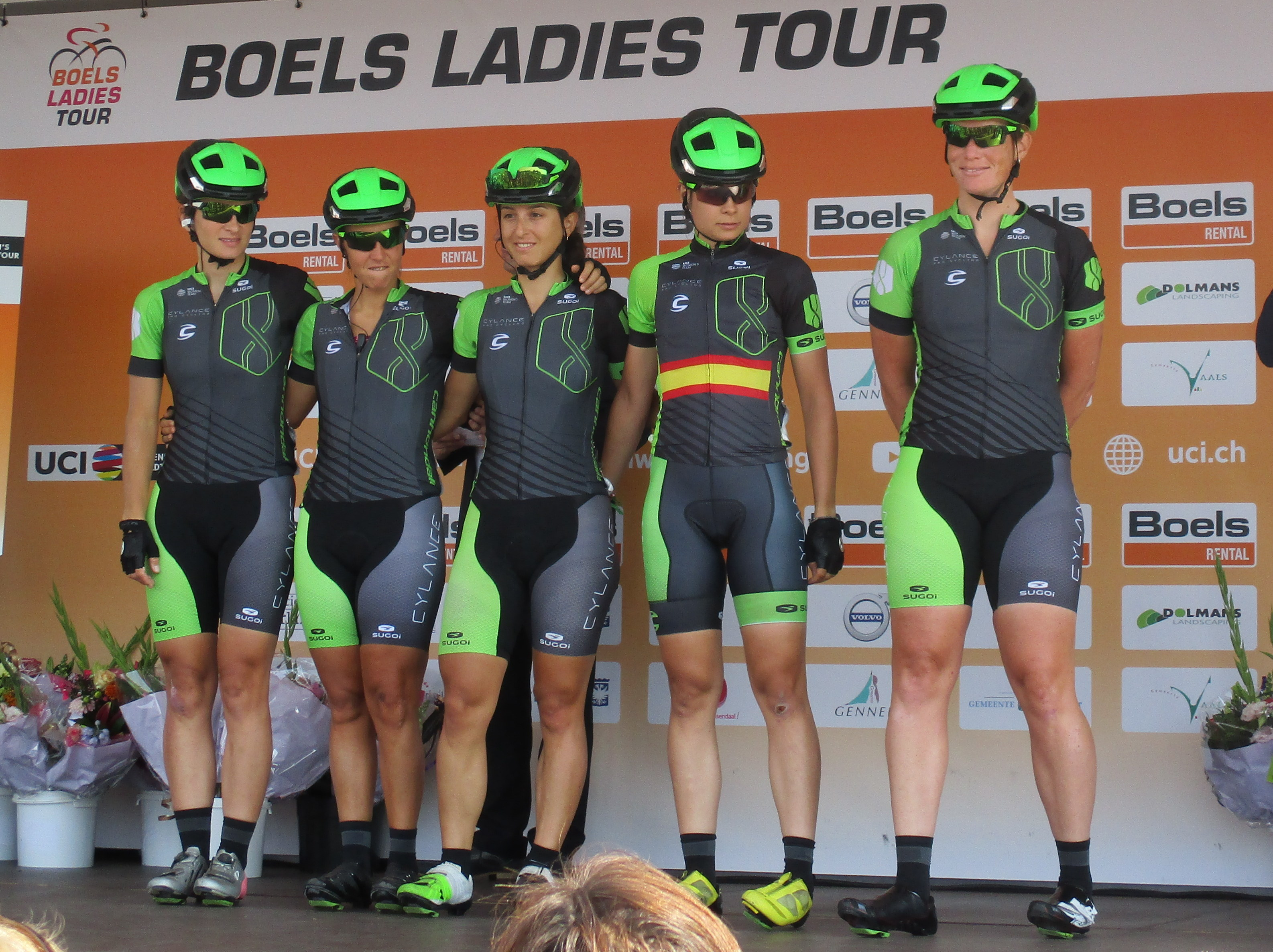 Start van de 6e etappe van de Boels Ladies Tour 2017 op het Tom Dumoulin Bike Park in Sittard-Geleen.